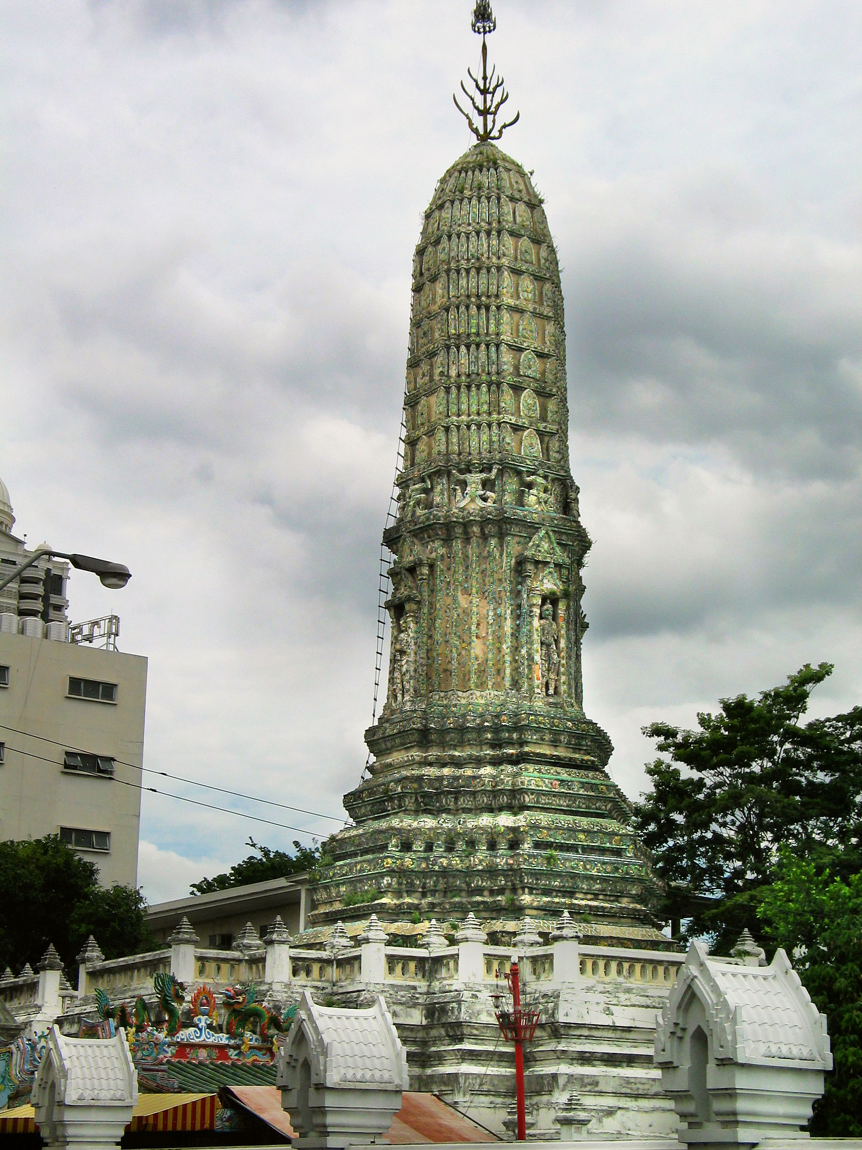 Prang (Ayutthaya style) of Wat Ratchaburana, Bangkok, Thailand.